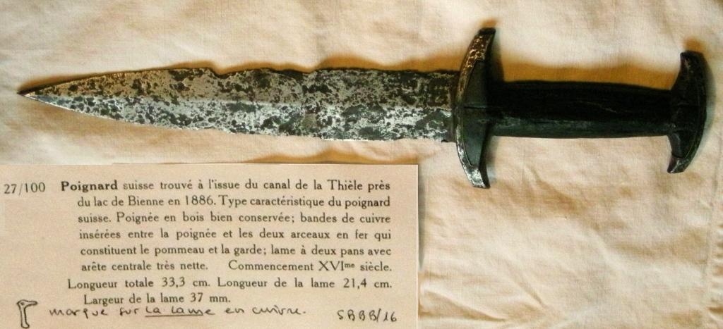 Schweizerdolch, ca. 1500 ("frühes 16. Jh."), gefunden 1886 im Aushub des Thièle-Kanals, Nähe Bielersee.